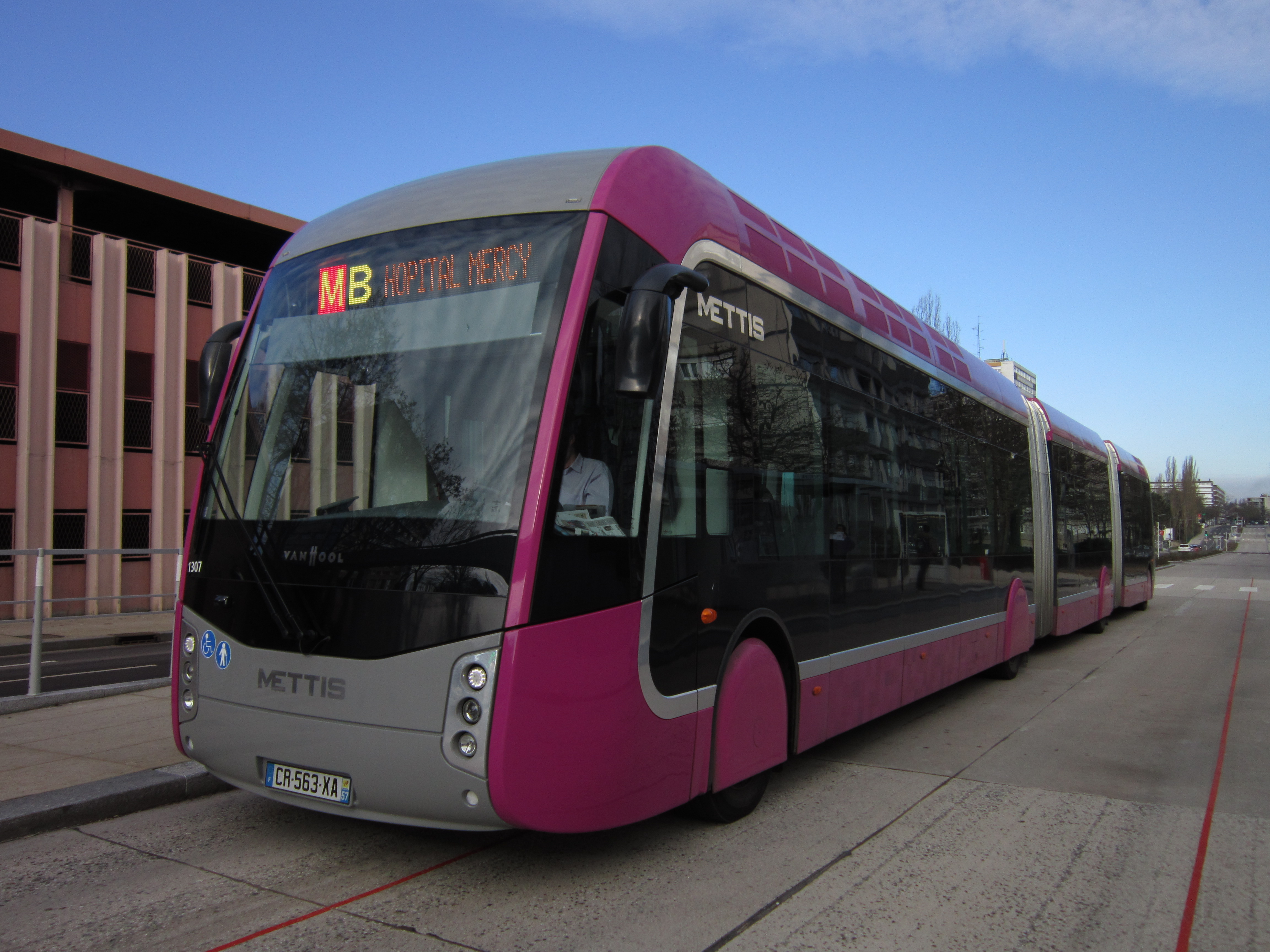 Van Hool Exquicity 24 n°1307 sur la ligne B à la station Henri Bergson.